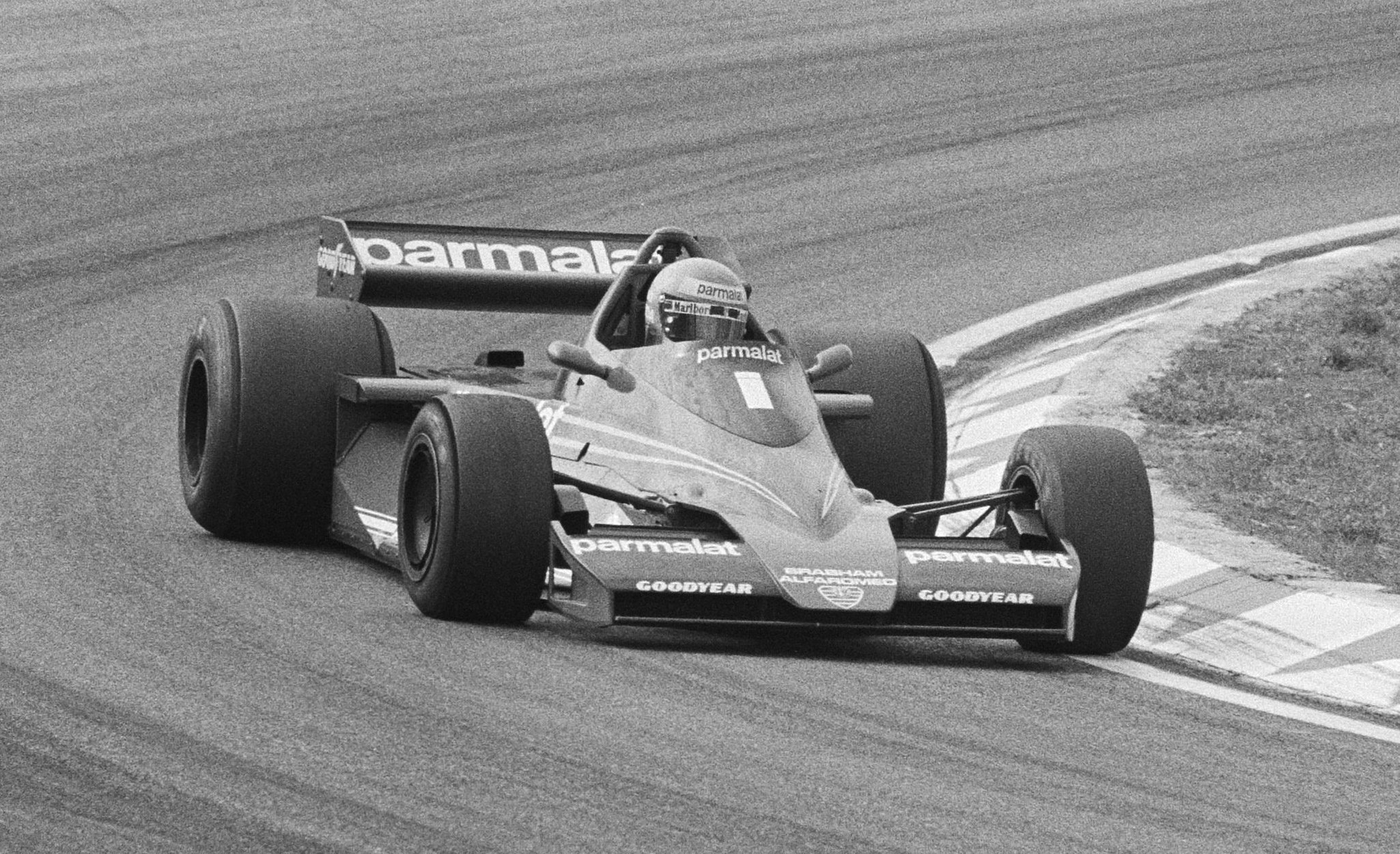 Grand Prix Zandvoort; Niki Lauda in actie.